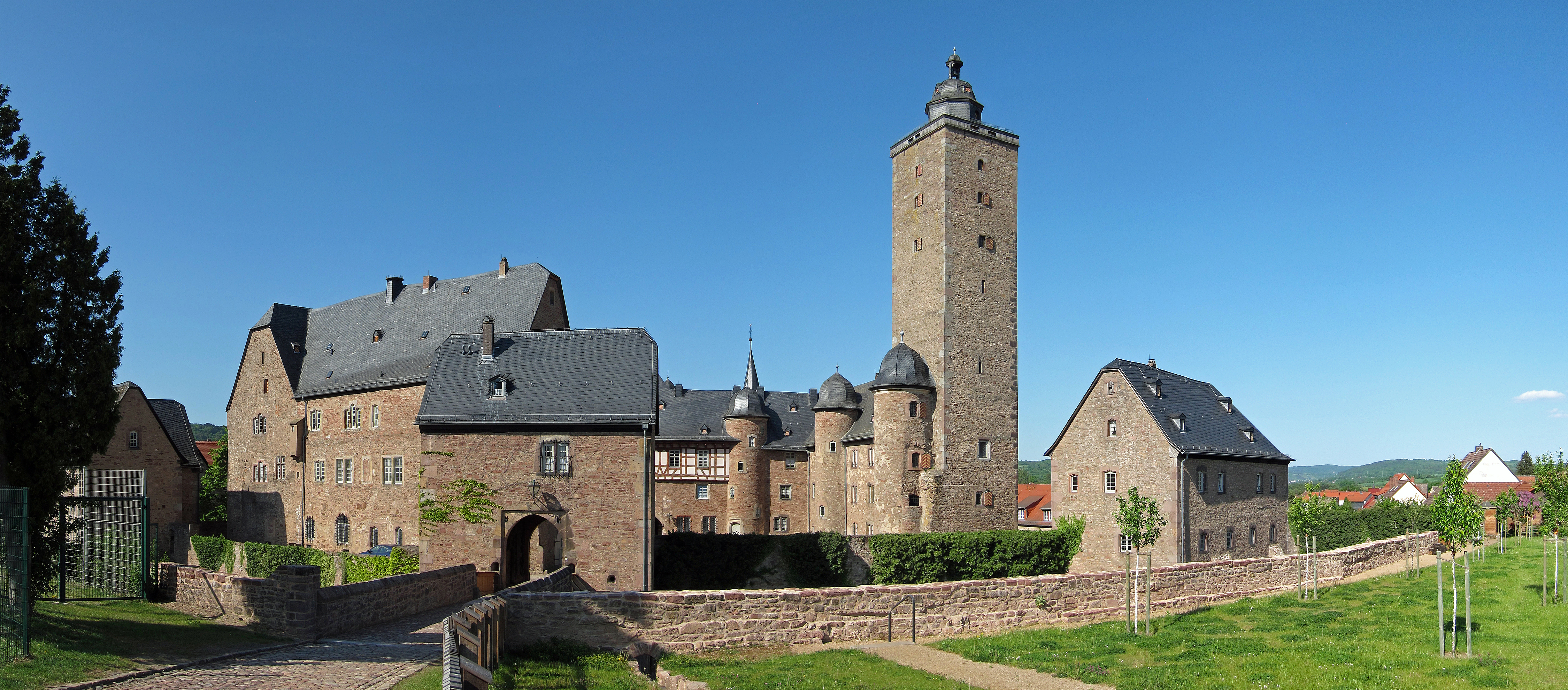 Schloss Steinau